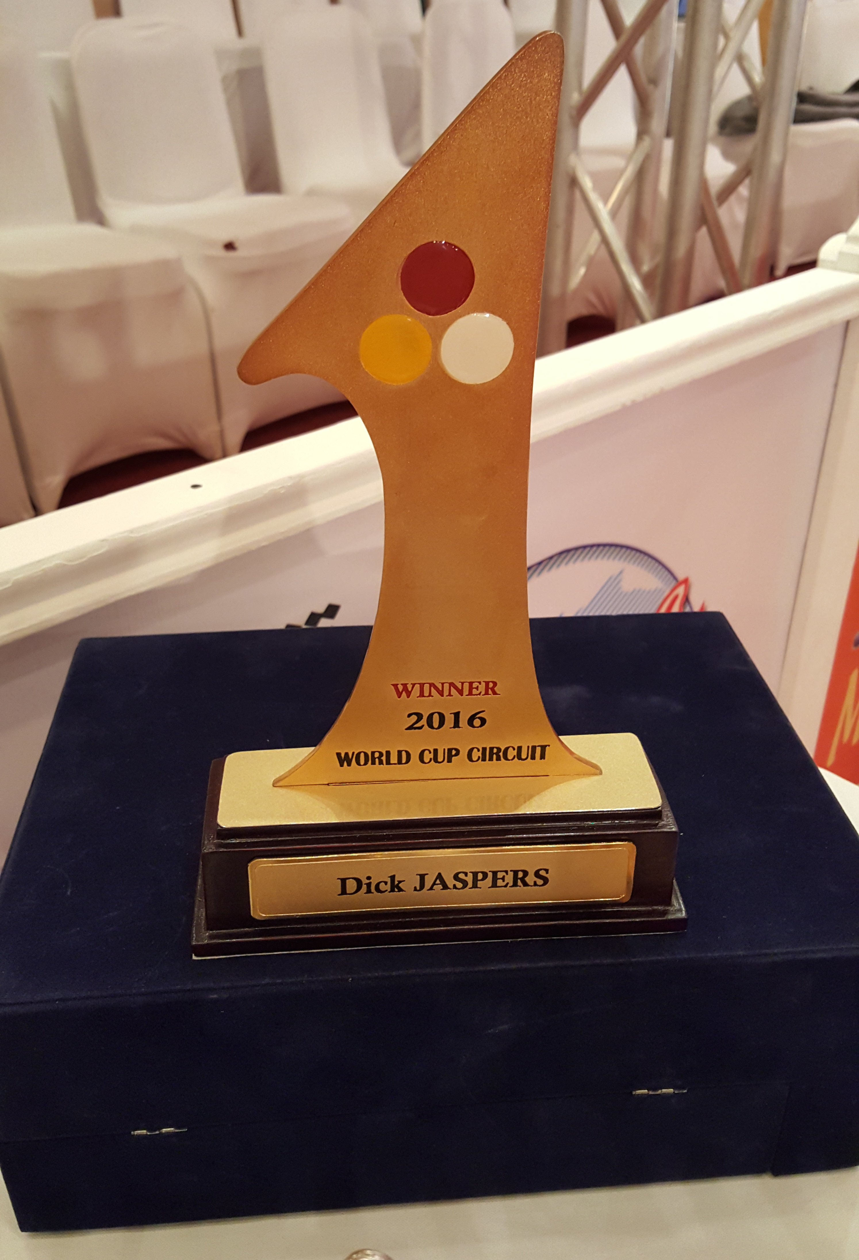 2016 3-Cushion World Cup-Trophies-2